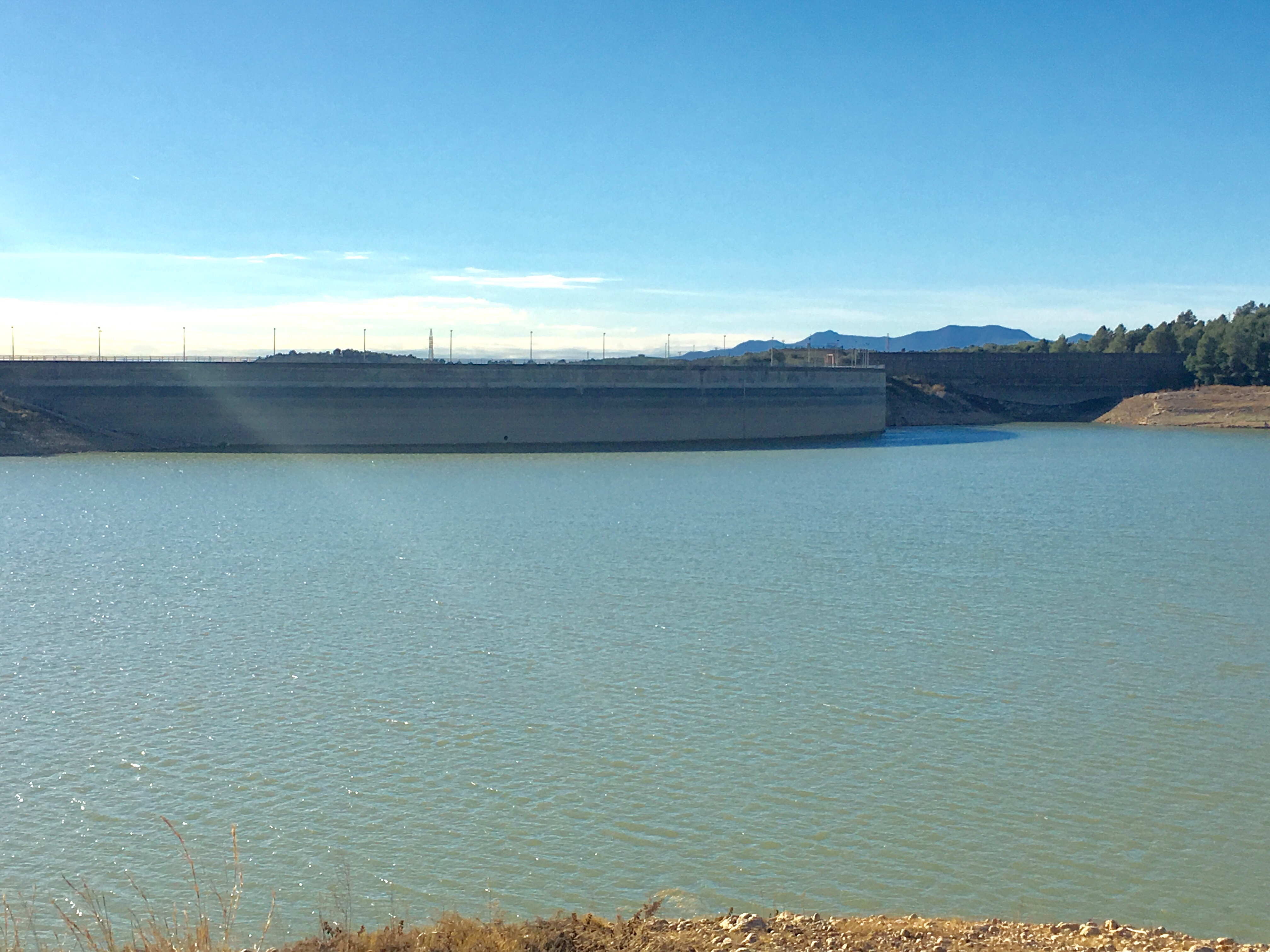 Se puede observar la presa del embalse Maria Cristina, esta foto está realizada por Maria Hirniak Pitarch y María Mira Gala desde el pinar.